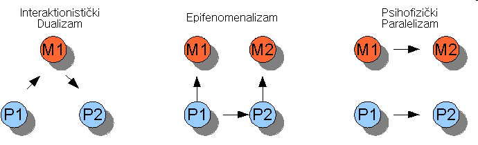 Tri vrste dualizma. Strelice pokazuju smjer kauzalne interakcije. Dualizam svojstava nije prikazan.